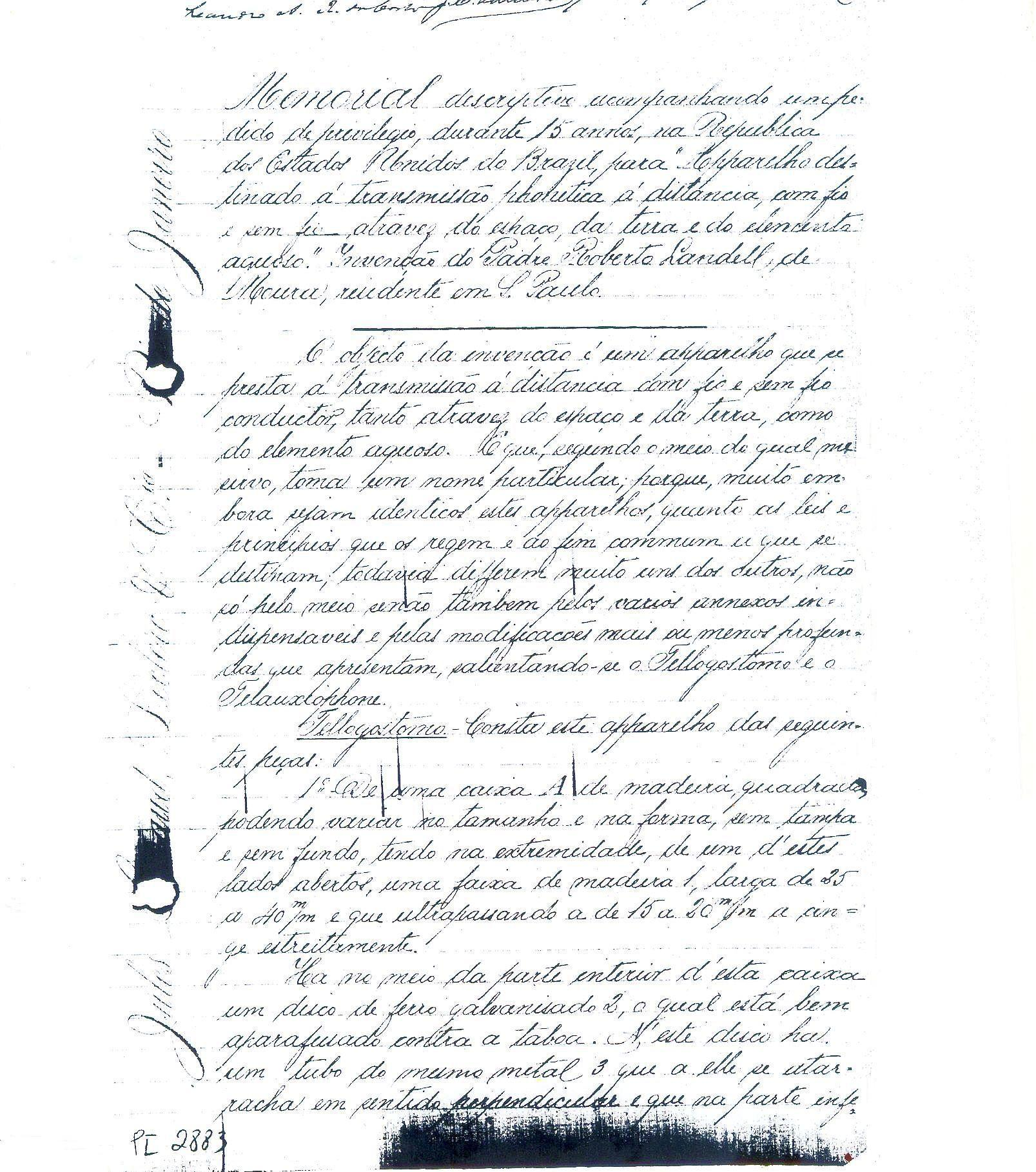 Memorial Descritivo para "Aparelho destinado à transmissão phonética à distância, com fio, sem fio, através do espaço, da terra e do elemento aquoso - Patente Brasileira n.3279 de 09 de Março de 1901.